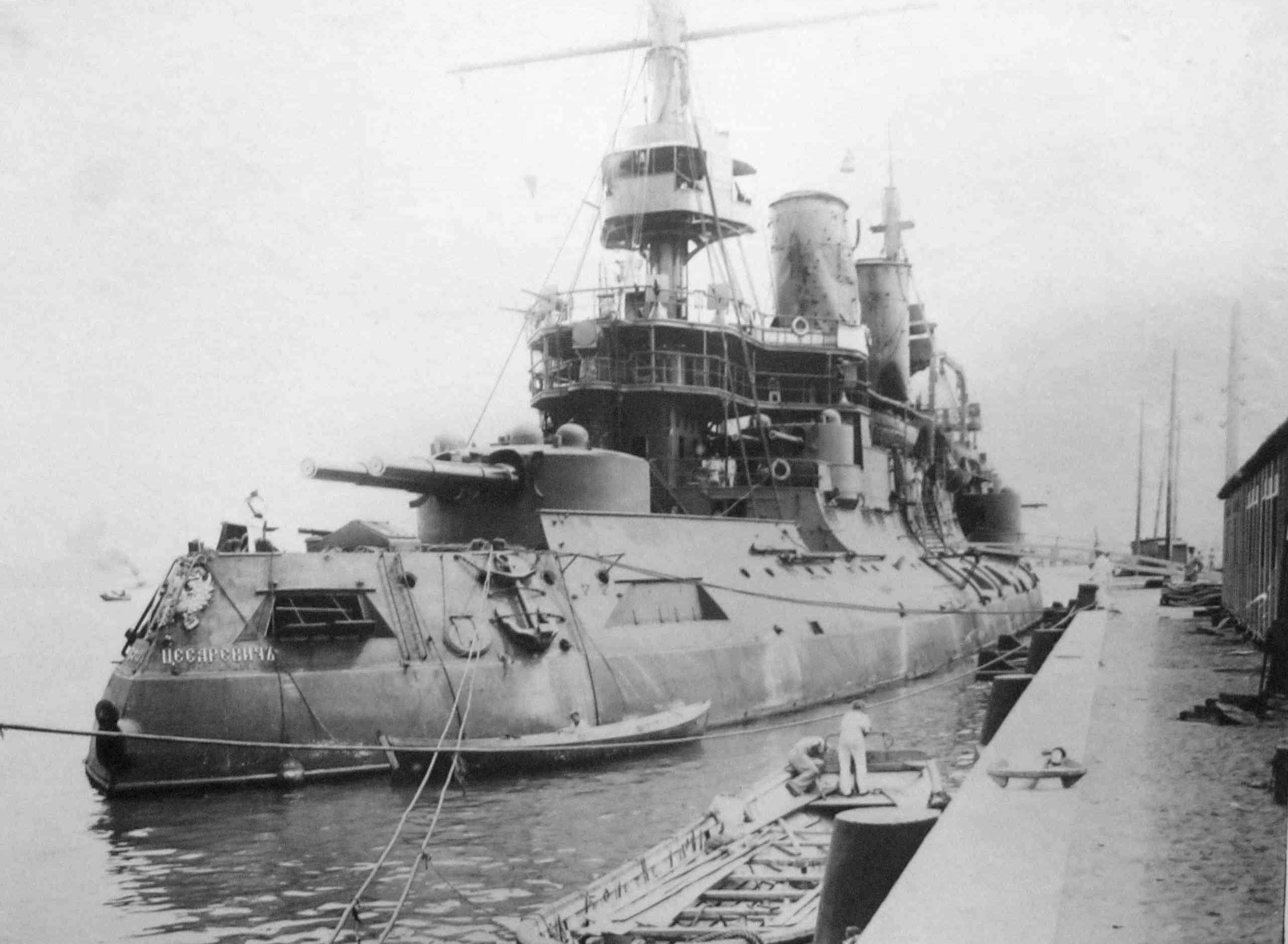 "Цесаревич" после сражения в Желтом море. Дата на фото 10 августа 1904 года.